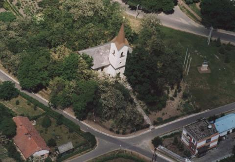 Nyírtass Hungary aerialphotography. Református templom, gótikus eredetű, átépített romantikus, 1880 körül. A karzat alatt korábbi, 18. sz.-i festett mennyezet része.azonosító 8403 (törzsszám 6082 This is a photo of a monument in Hungary, Identifier: 8403